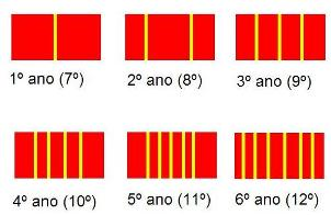 insignias del liceo militar eleazar lopez contras